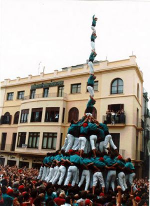 Primer Pilar de 8 amb folre i manilles descarregat en el segle XX. Castellers de Vilafranca